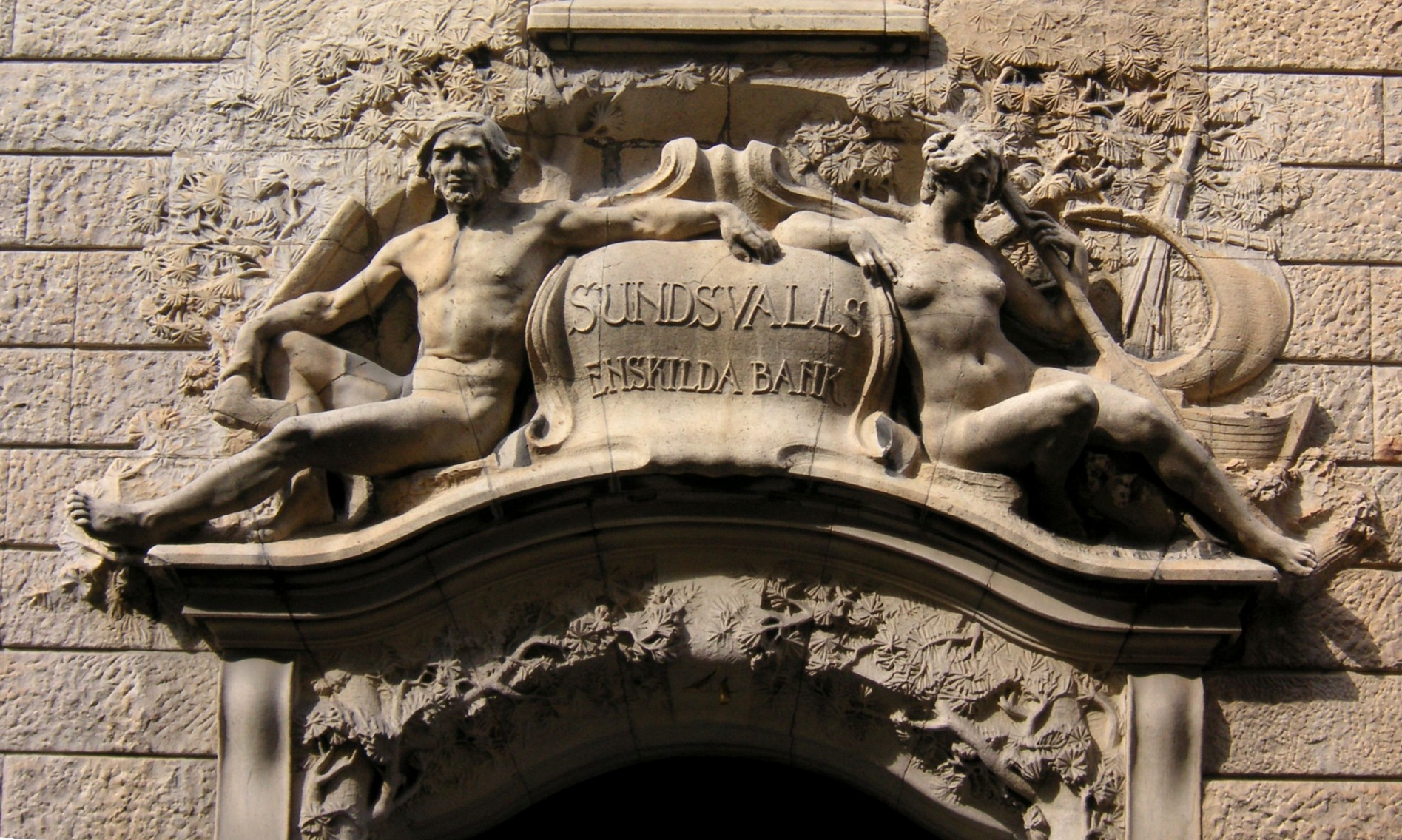 Christian Erikssons skulptur på Fredsgatan 4 på Norrmalm i Stockholm i kvarteret Johannes större 9 utanför Gamla Sundsvallsbanken. Portalfigurerna som formgavs av Christian Eriksson symboliserar Norrlands industri och sjöfart. Som modeller för Christian Eriksons portalfigur på Sundsvallsbanken i Stockholm stod konstnärens fru Jeanne Leocadie de Tramcourt och Nathan Söderblom, som under 1890-talet var ung präst i Svenska församlingen i Paris.